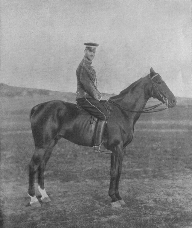 Великий князь Михаил Александрович.